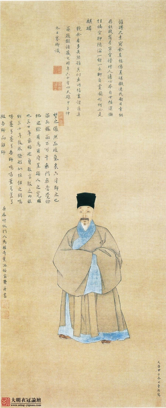 中文（香港）: 明代寫實容像